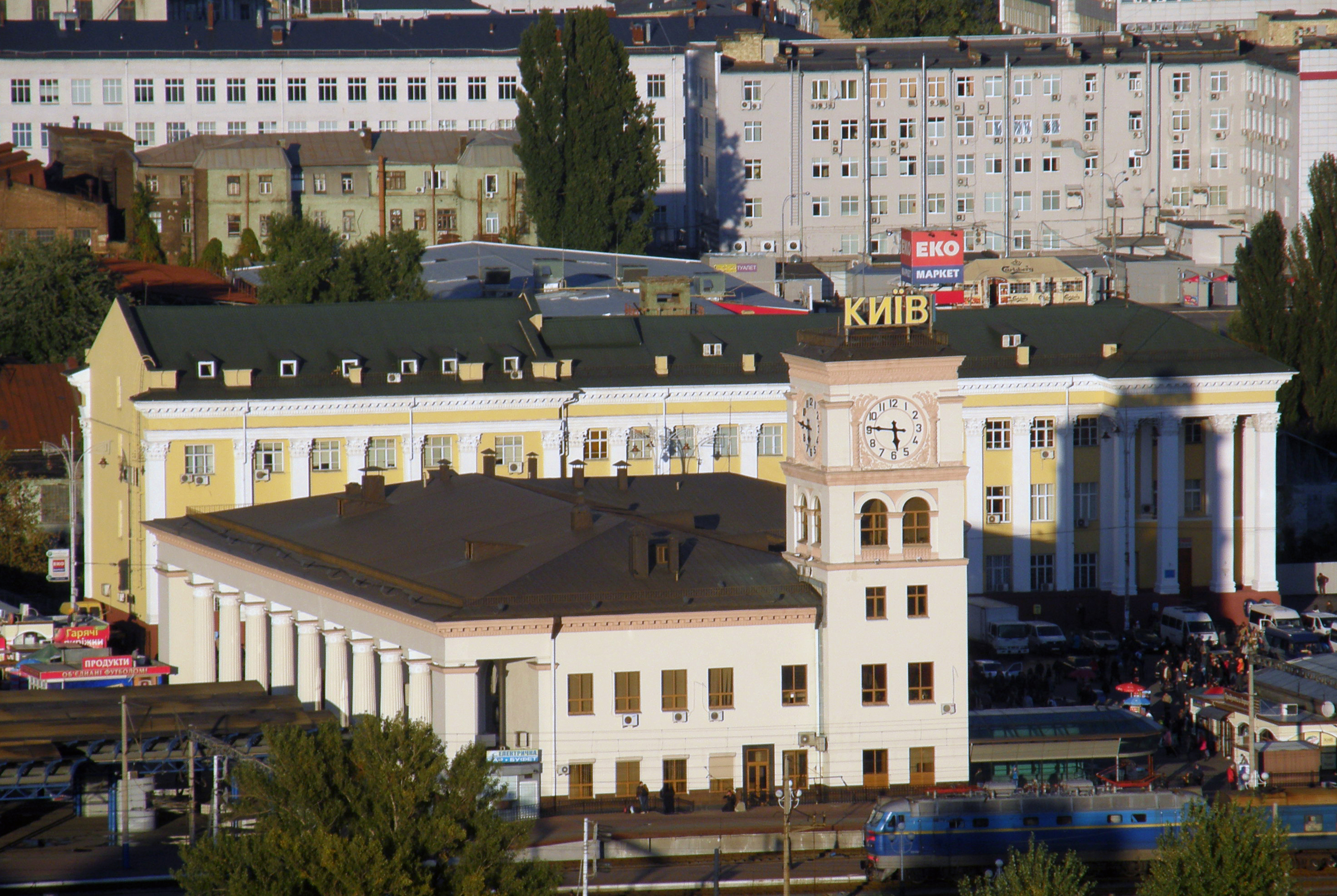 пригородный вокзал Киев